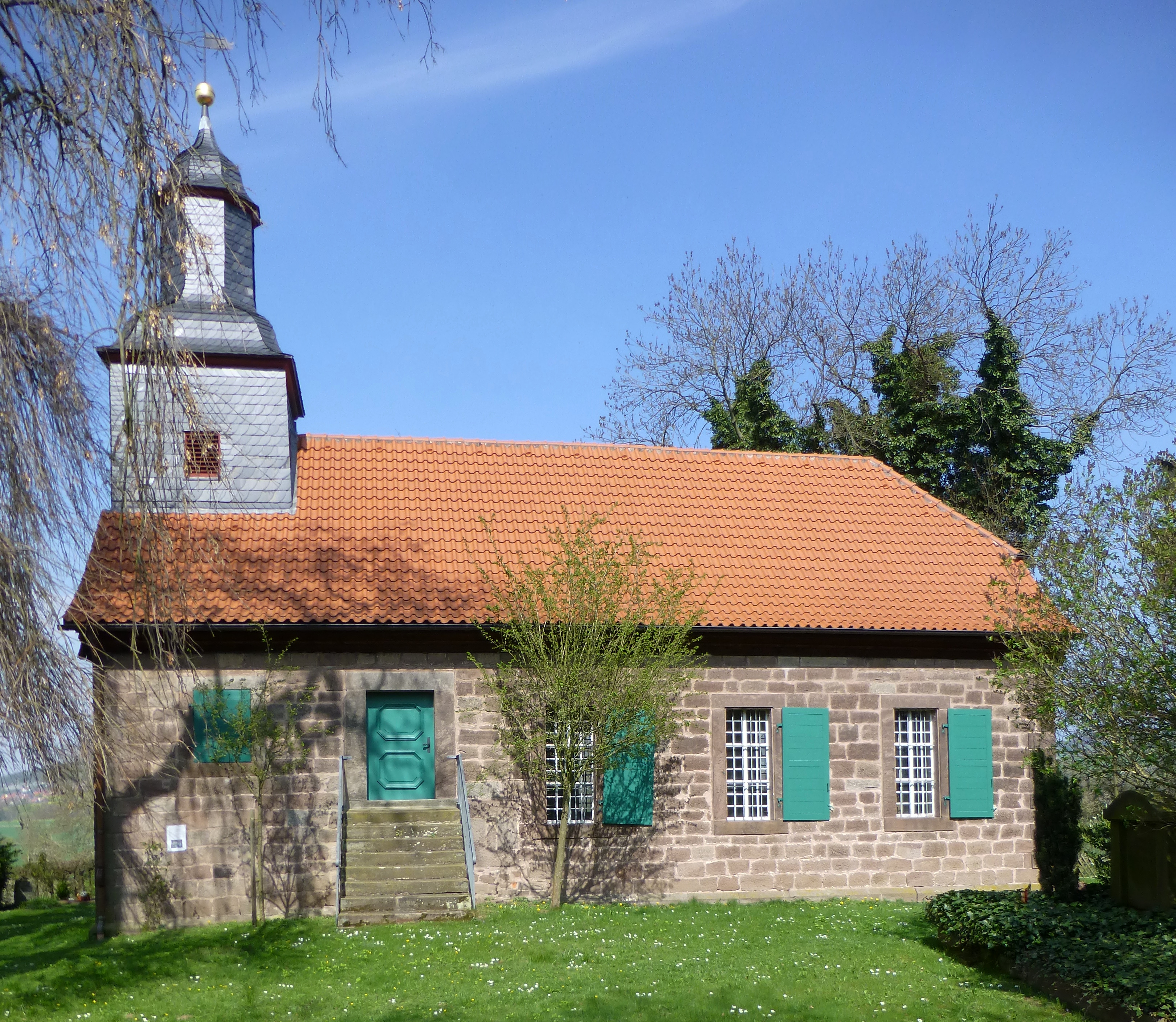 Ev.-luth. Kirche Hottenrode, ehemals Dorfkirche des untergagangenen Dorfes Hottenrode bei Niedergandern, Gemeinde Friedland, Südniedersachsen